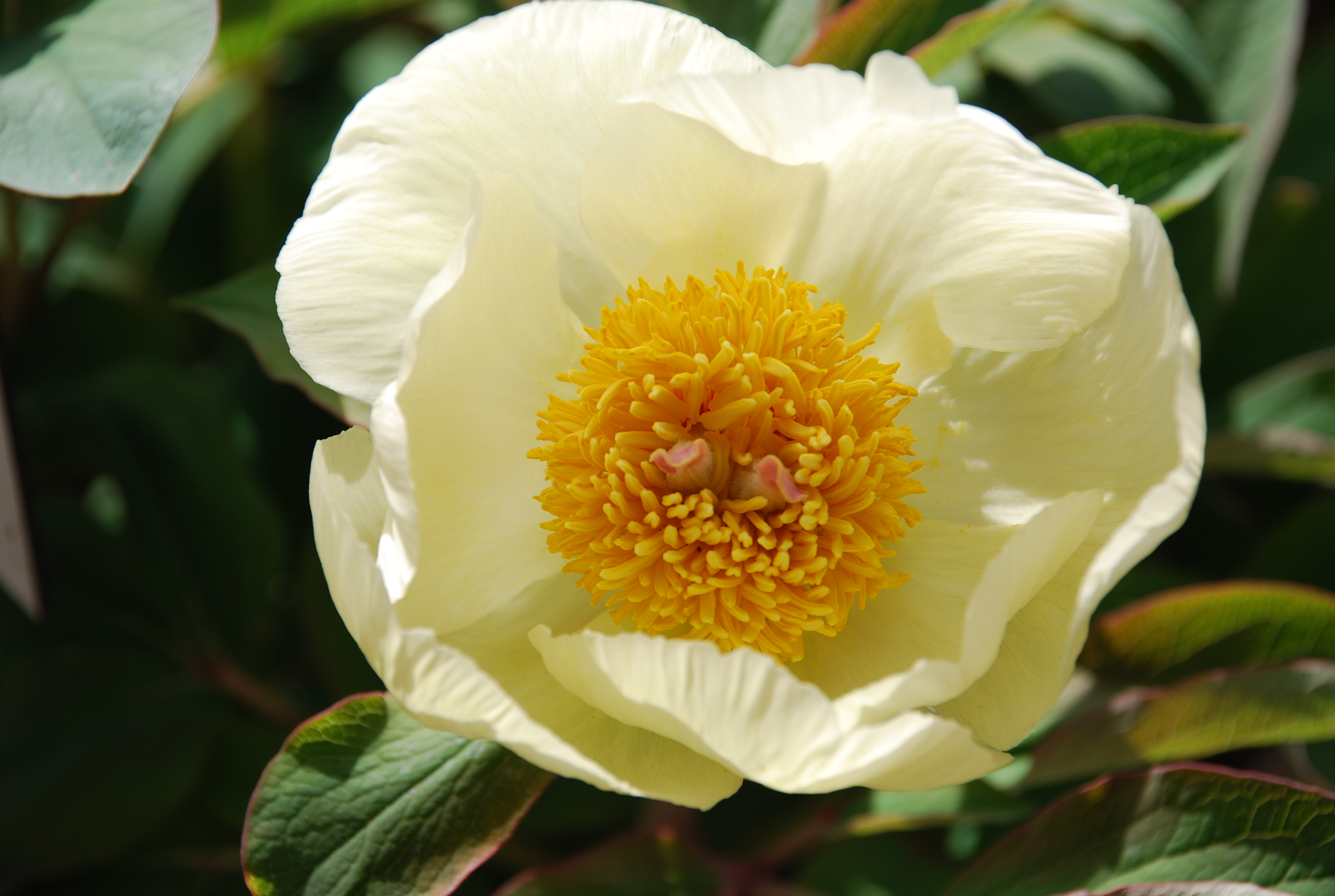 Krim-Pfingstrose (Paeonia daurica subsp. mlokosewitschii) Peony (Paeonia daurica subsp. mlokosewitschii)